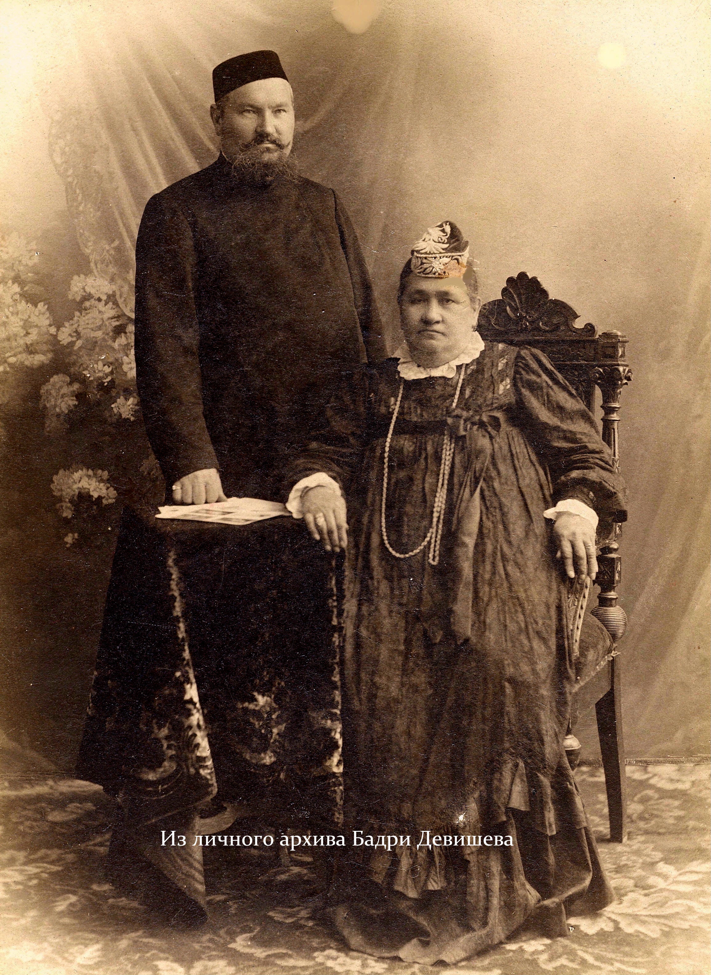 Камалетдин и Бадгульниса